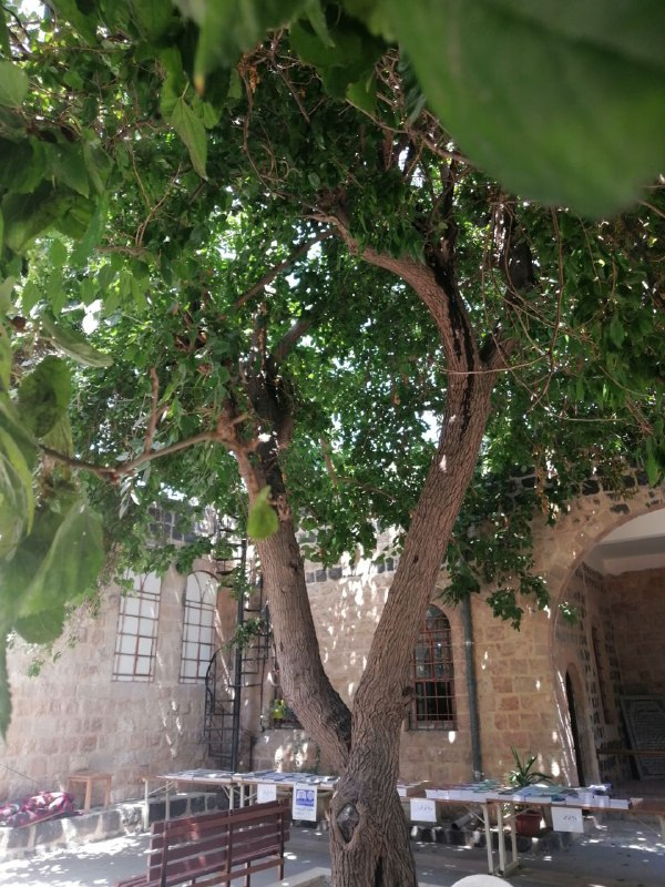 شجرة تتوسط داخل بيت عرار ذات بعد تاريخي